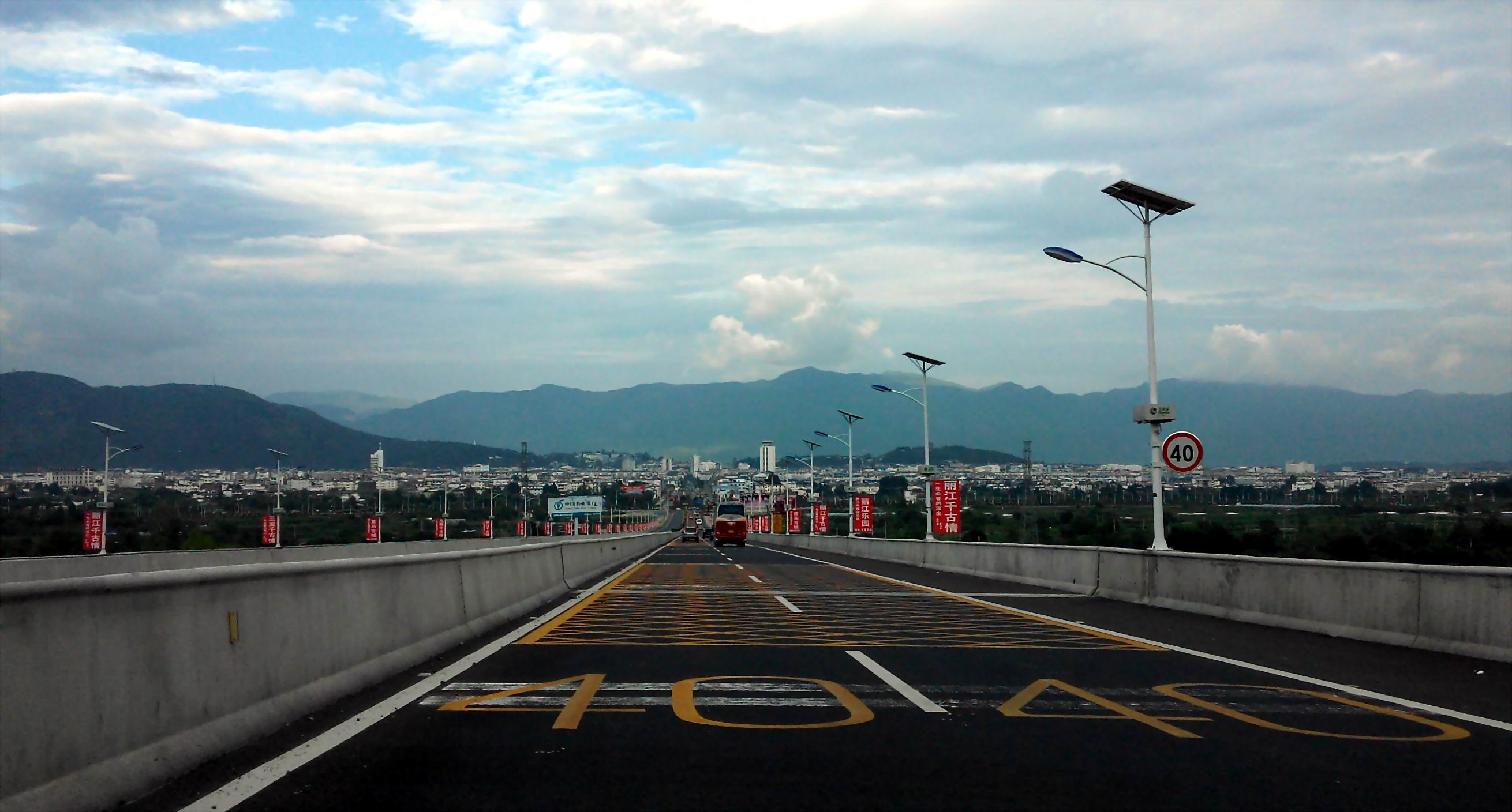 中国高速G5611 丽江方向 终点